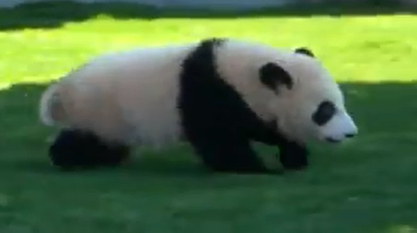 南紀白浜アドベンチャーワールドのジャイアントパンダ優浜ちゃん。